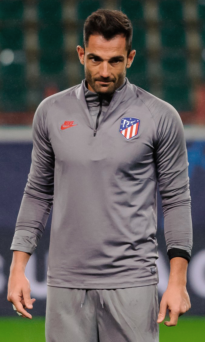 «Атлетико» готовится к матчу с «Локомотивом»